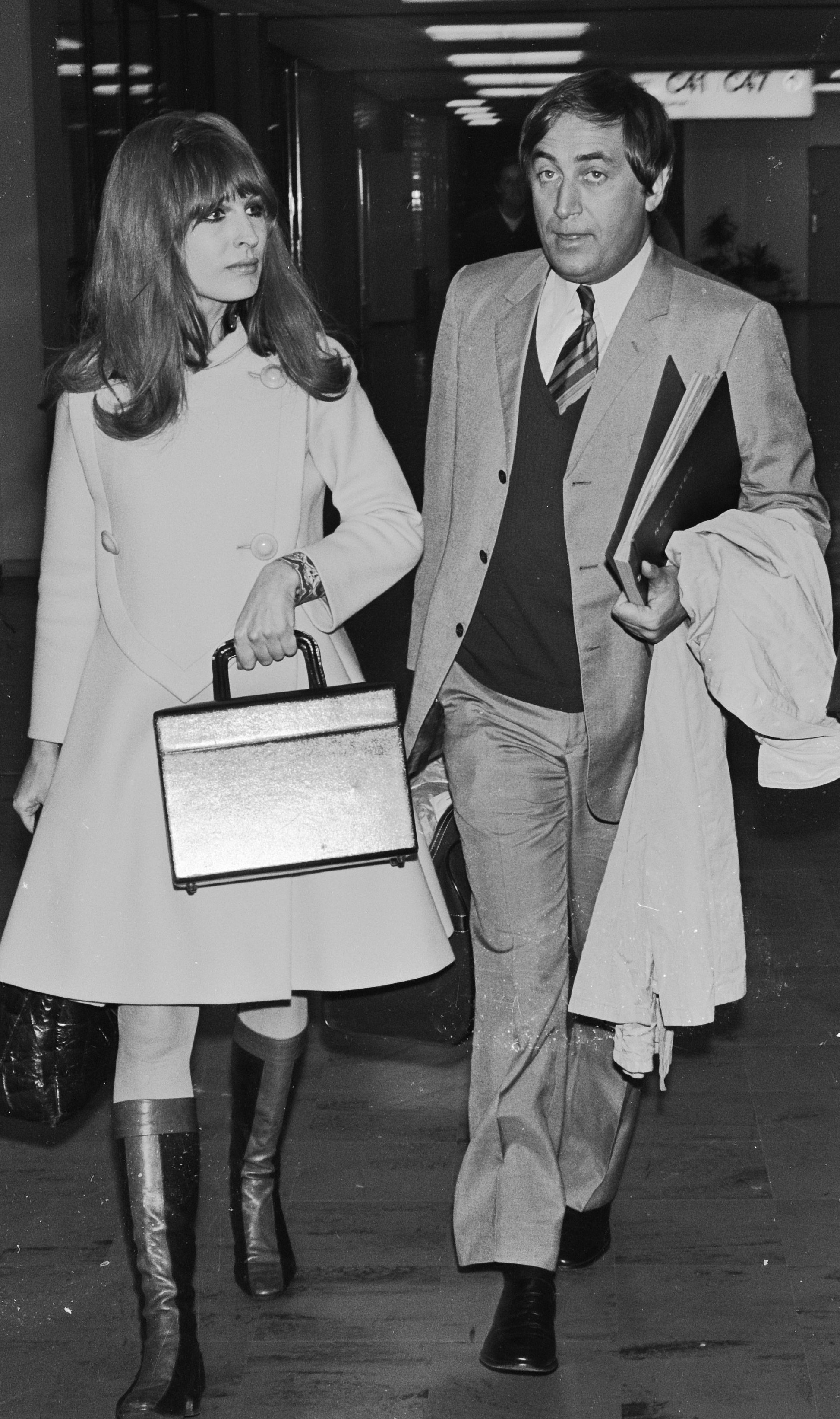 Aankomst Liesbeth List op Schiphol terug van Rio de Janeiro. Naast haar Cees Nootenboom. 9 november 1967